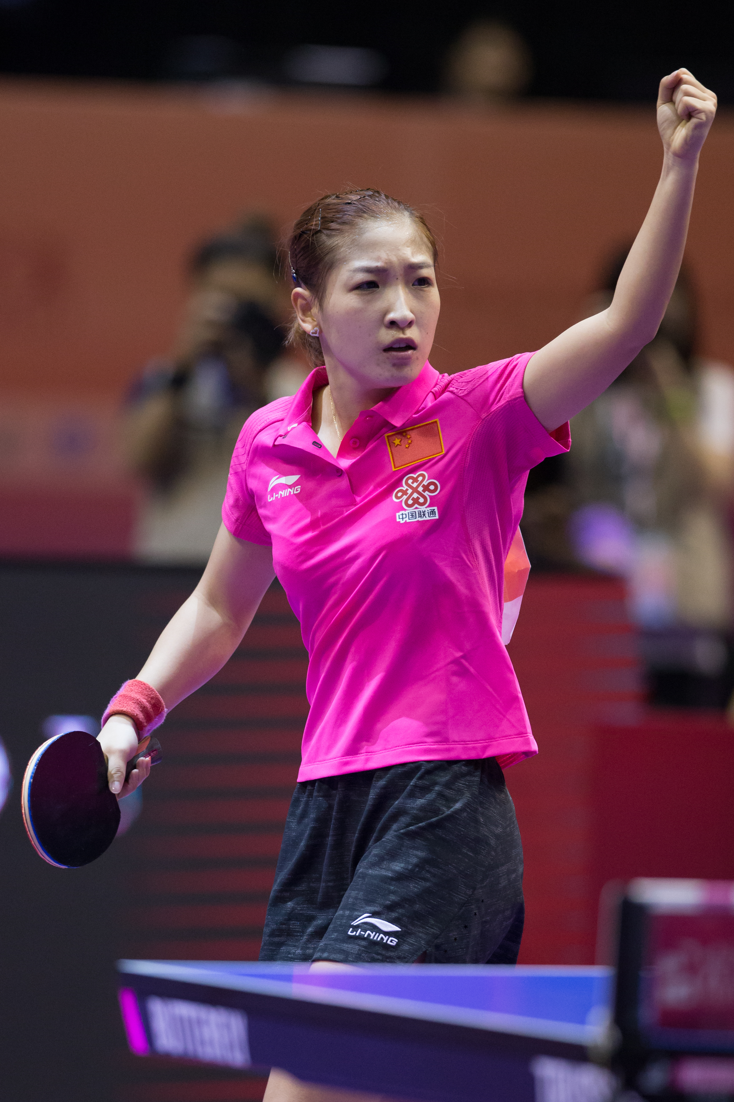 _K0K6344